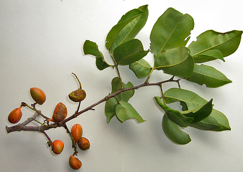 Swartzia apetala Raddi var. subcordata R. S. Cowan